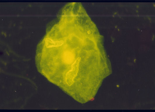 Epithelzelle im Urin. Zwei wachsähnliche? Gebilde im Zytoplasma. Fluoreszenzmikroskopie,Acridinorange-Färbung